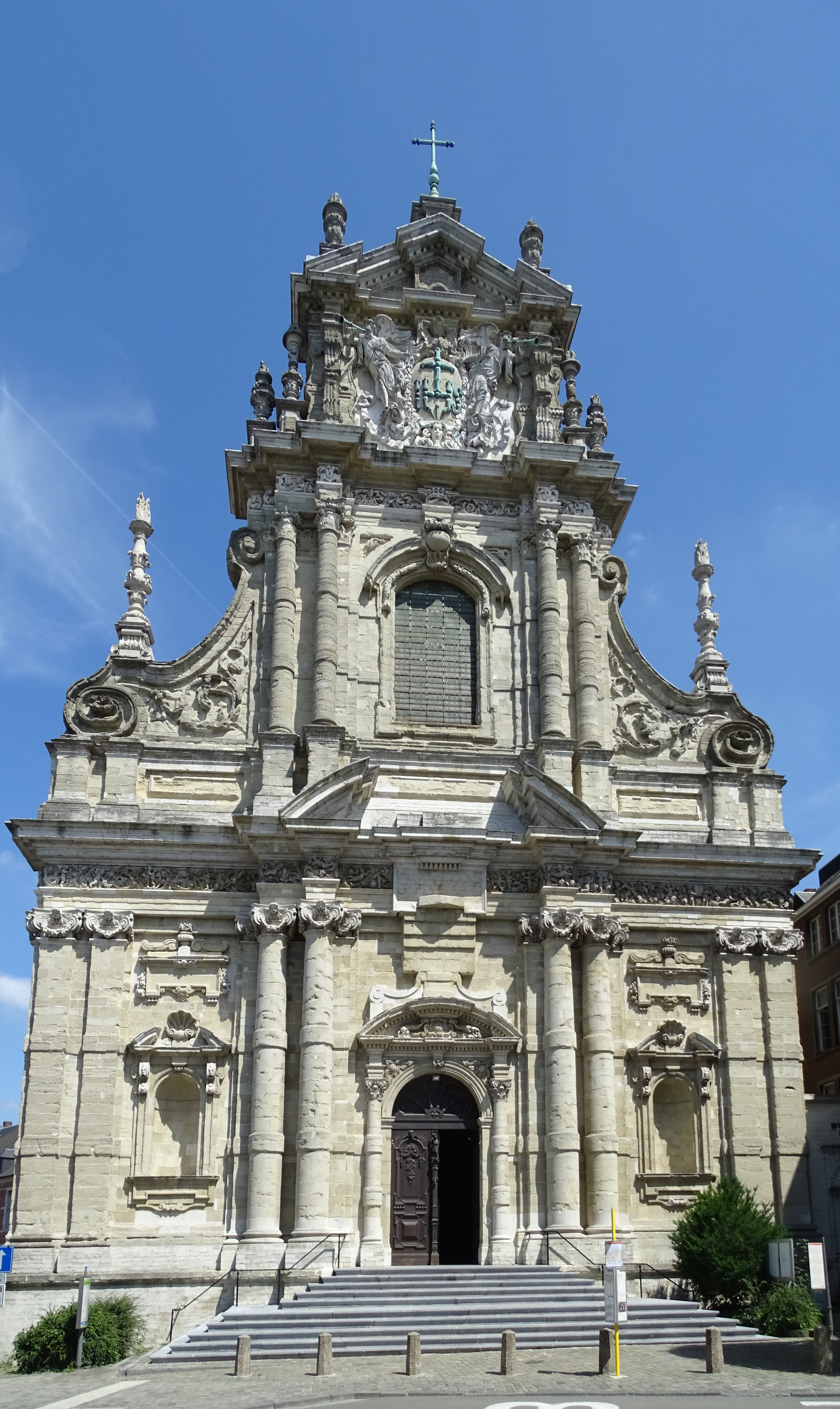 De Sint-Michielskerk te Leuven, naar een ontwerp van Willem Hesius s.j.